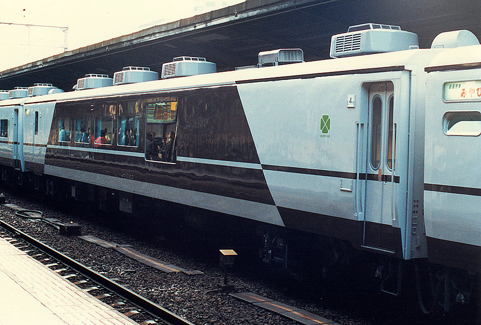 国鉄 14系お座敷 みやび 4号車 オロ14 803